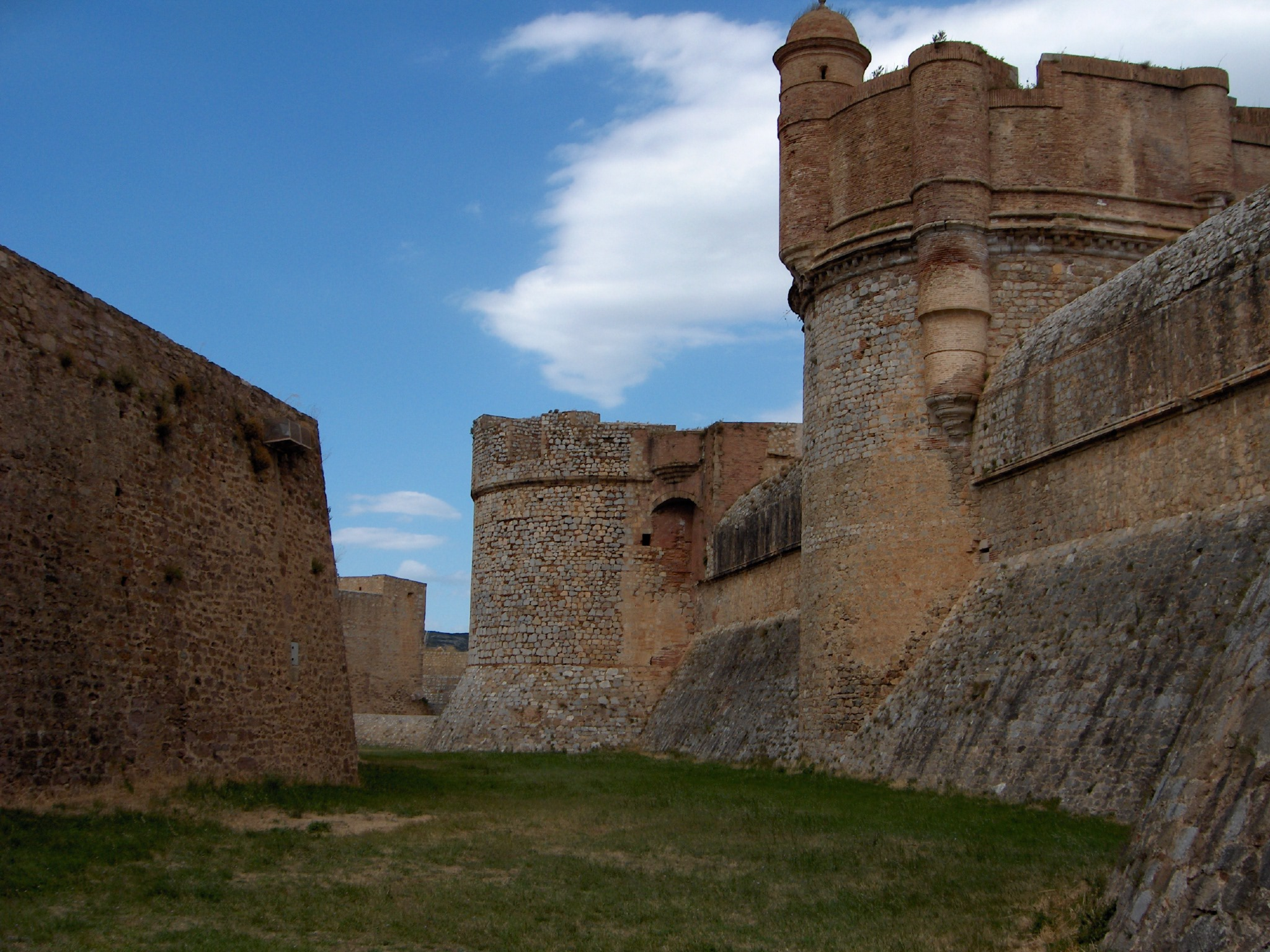 Les remparts de Salses - fossé - entrée principale photo prise par mes soins pas de droits